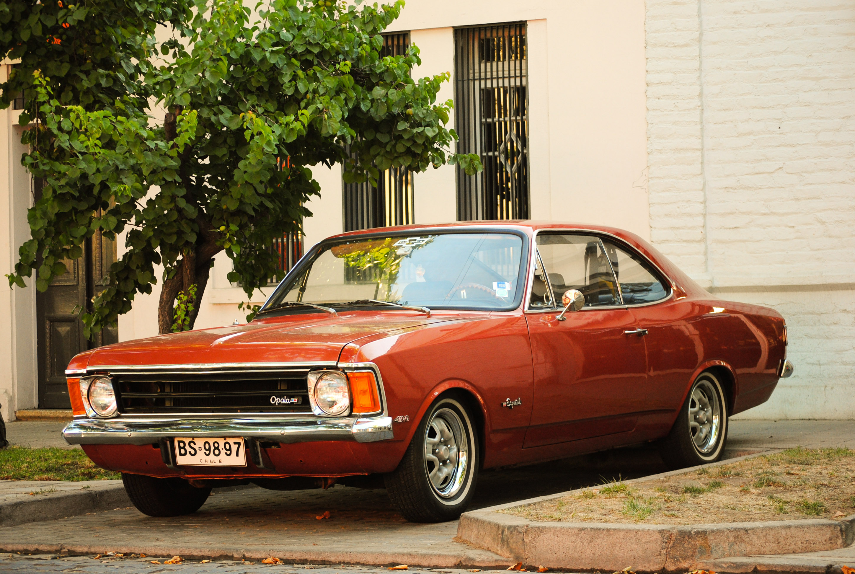 Chevrolet Opala: En Chile y en Brasil fueron sinónimo de terror en los 80, utilizados por la policía política para secuestrar, torturar y hacer desaparecer a personas. Mario Navarro expuso en la 27ª Bienal de São Paulo una serie de obras sobre su simbolismo del miedo. Para mi, el primer auto al que me subí. Conducido por don Eugenio, el vecino taxista que me llevaba todos los días al colegio los primeros años del colegio. Hoy el Opala es un auto despreciado y escaso, y raramente de colección.